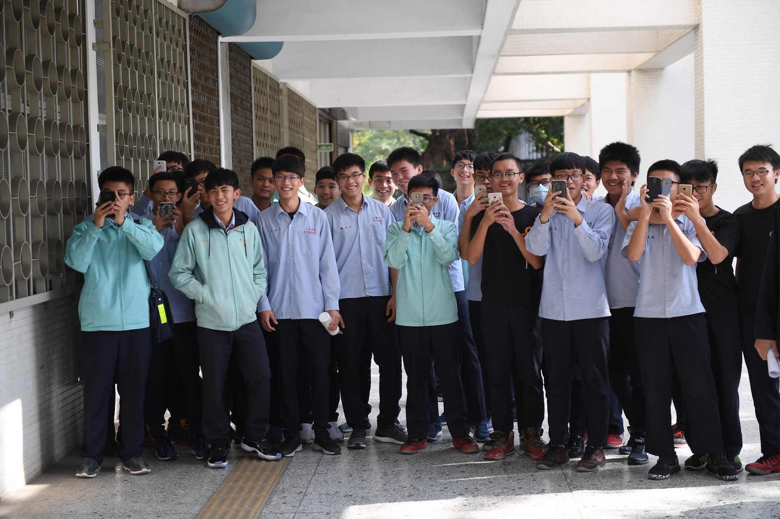 12.23 總統參訪「國立臺中高級工業職業學校」，學生紛紛拿起手機記錄